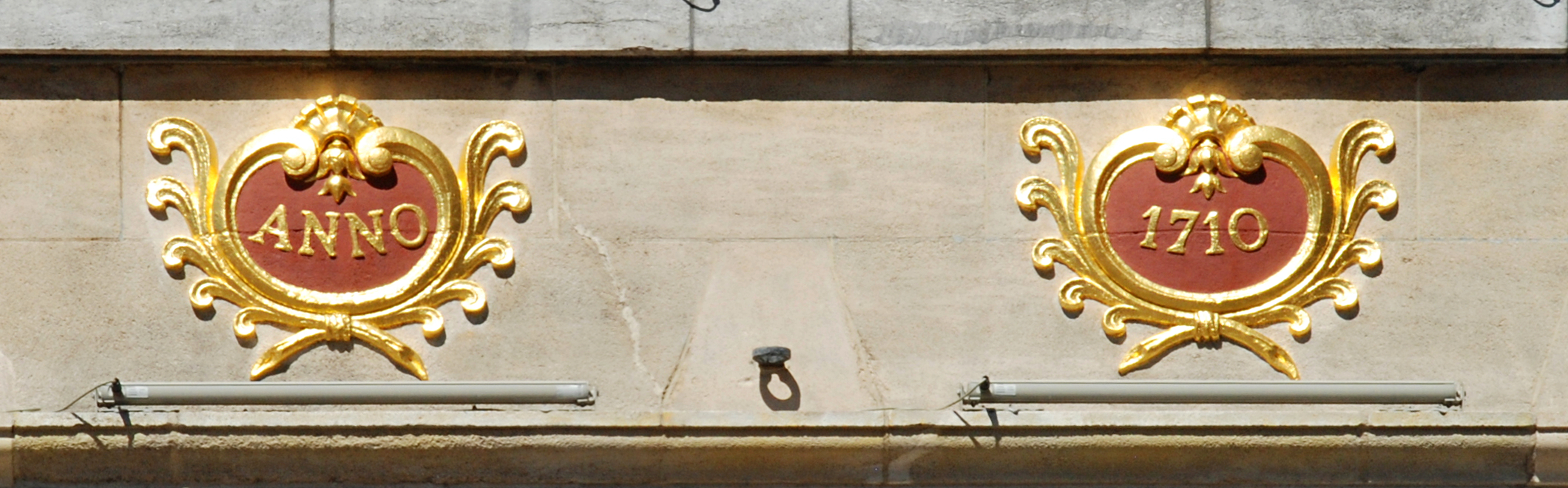 Belgique - Bruxelles - Grand-Place - Maison du Cerf